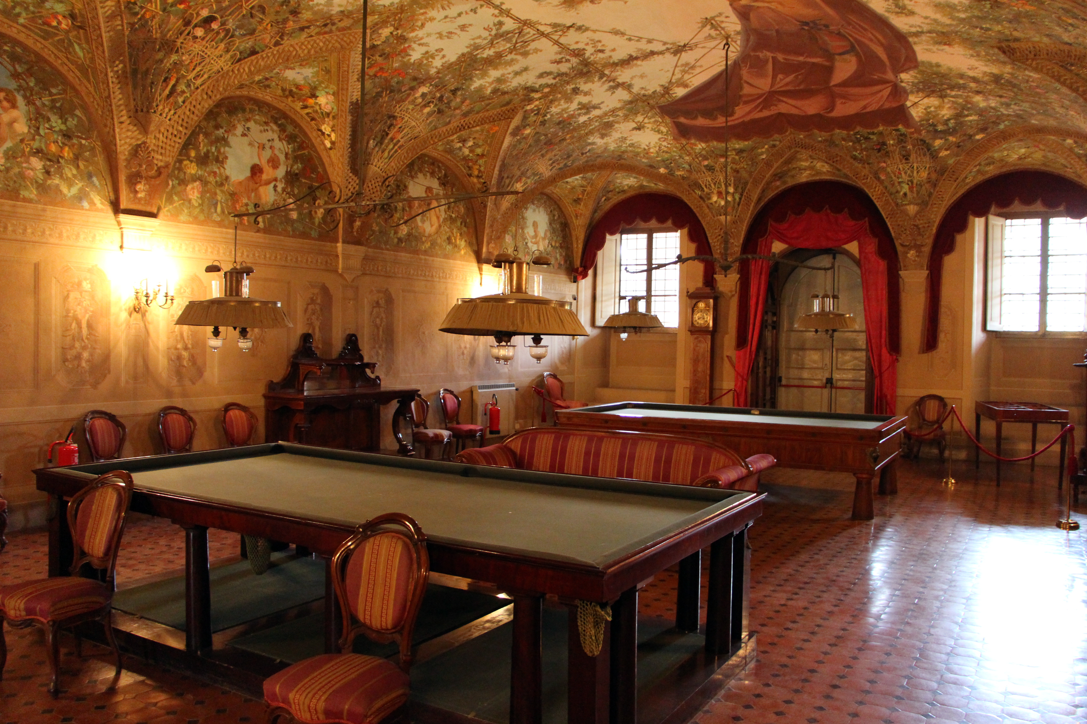 Villa medicea di Poggio a Caiano - MIBAC The making of this document was supported by Wikimedia CH. (Submit your project!) For all the files concerned, please see the category Supported by Wikimedia CH. This is a photo of a monument which is part of cultural heritage of Italy.